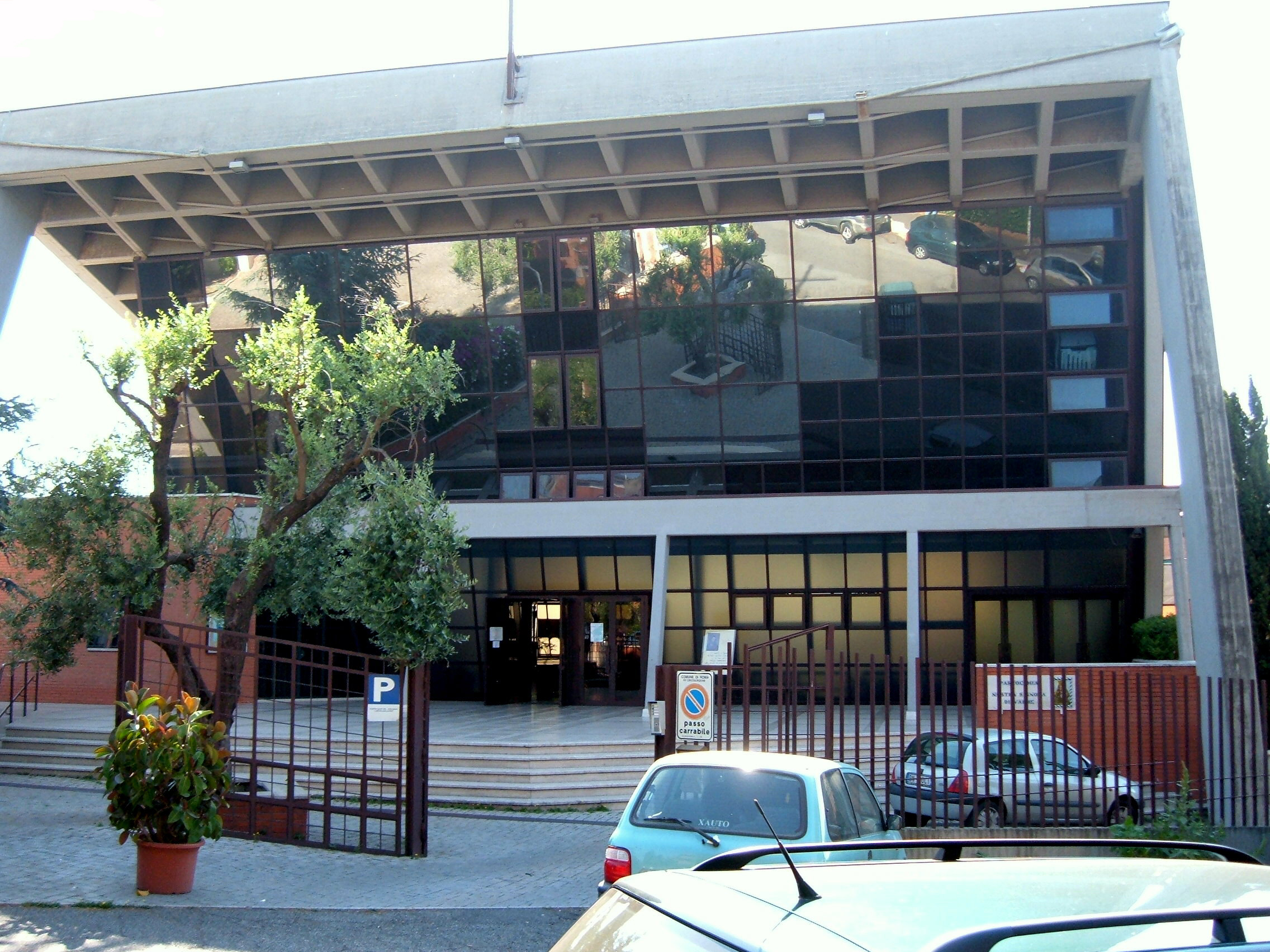 Chiesa di Nostra Signora di Valme, a Roma, nel quartiere Portuense.